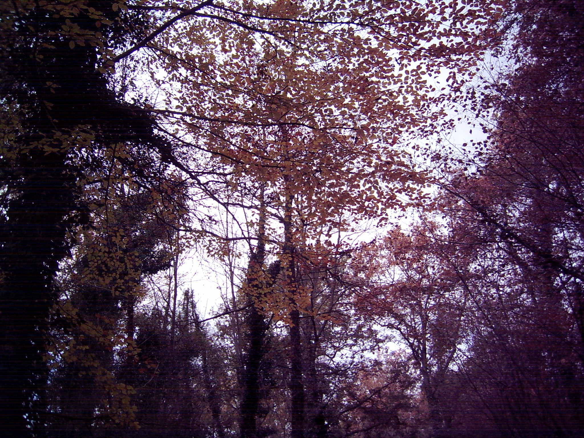 La Fageda d'en Jordà (Espanya) - Poesia de Joan Maragall.